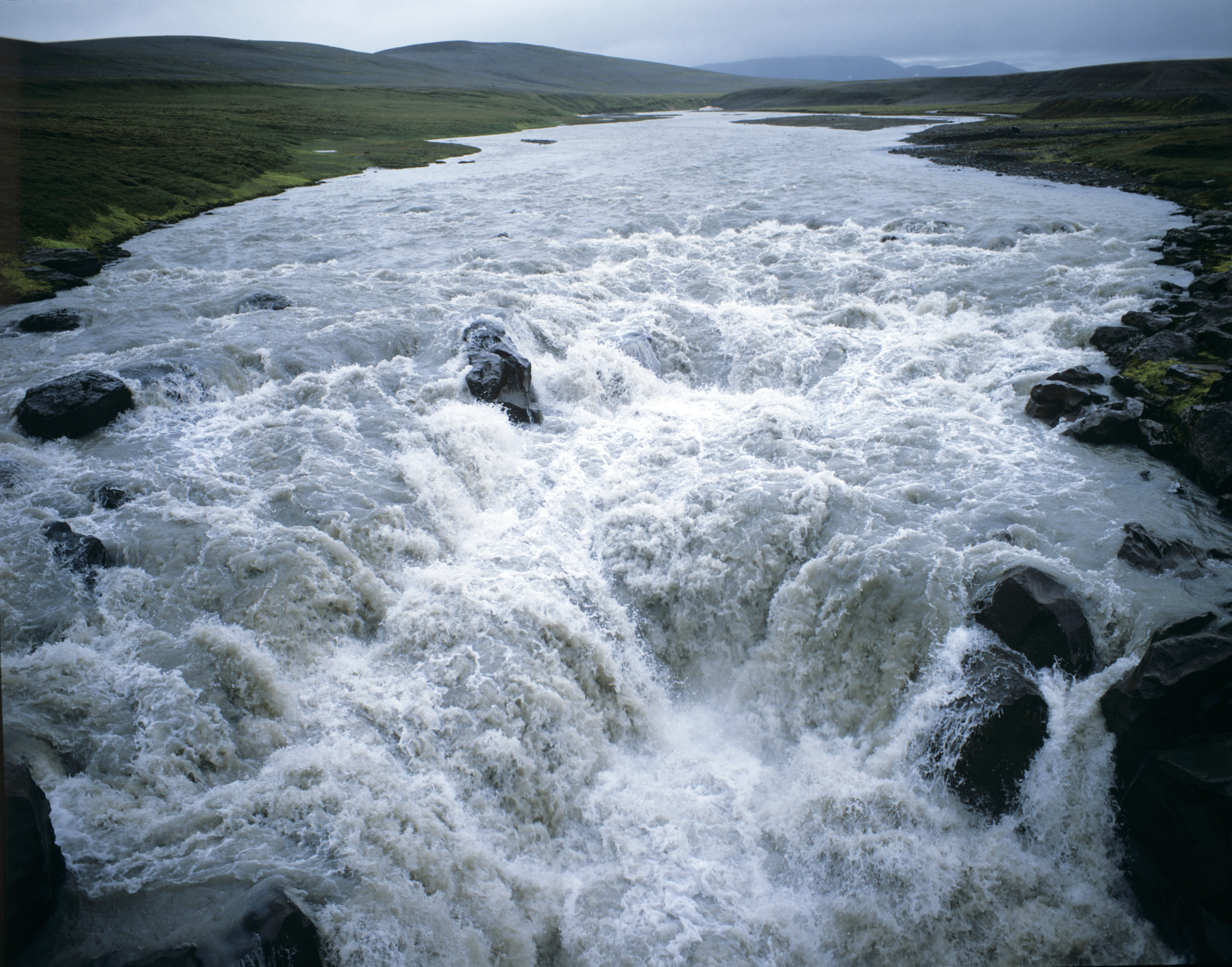 Kerlingafoss an der Dalsá, einem Nebenflüsschen der Hvítá